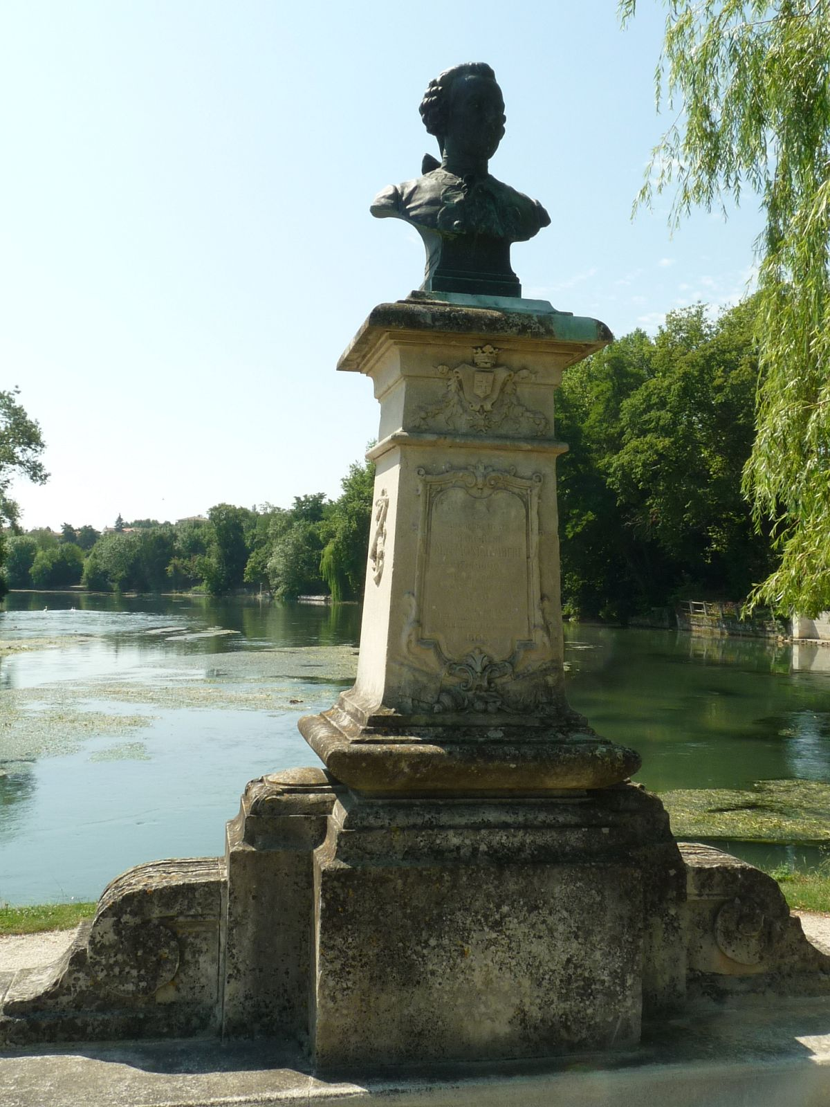 Marquis de Montalembert (1800), fondateur de la fonderie de Ruelle (16), France